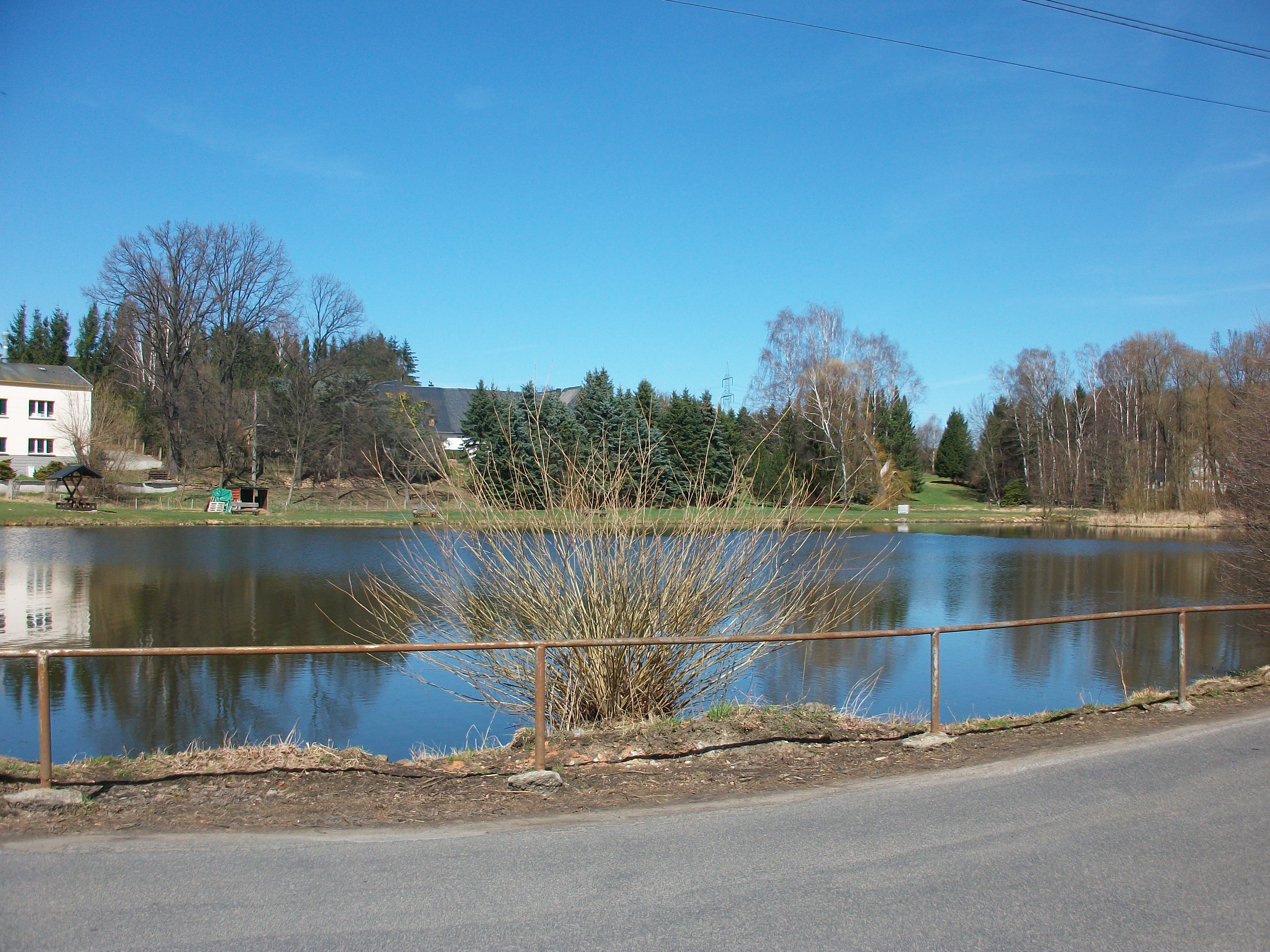 Teich in Bräunsdorf